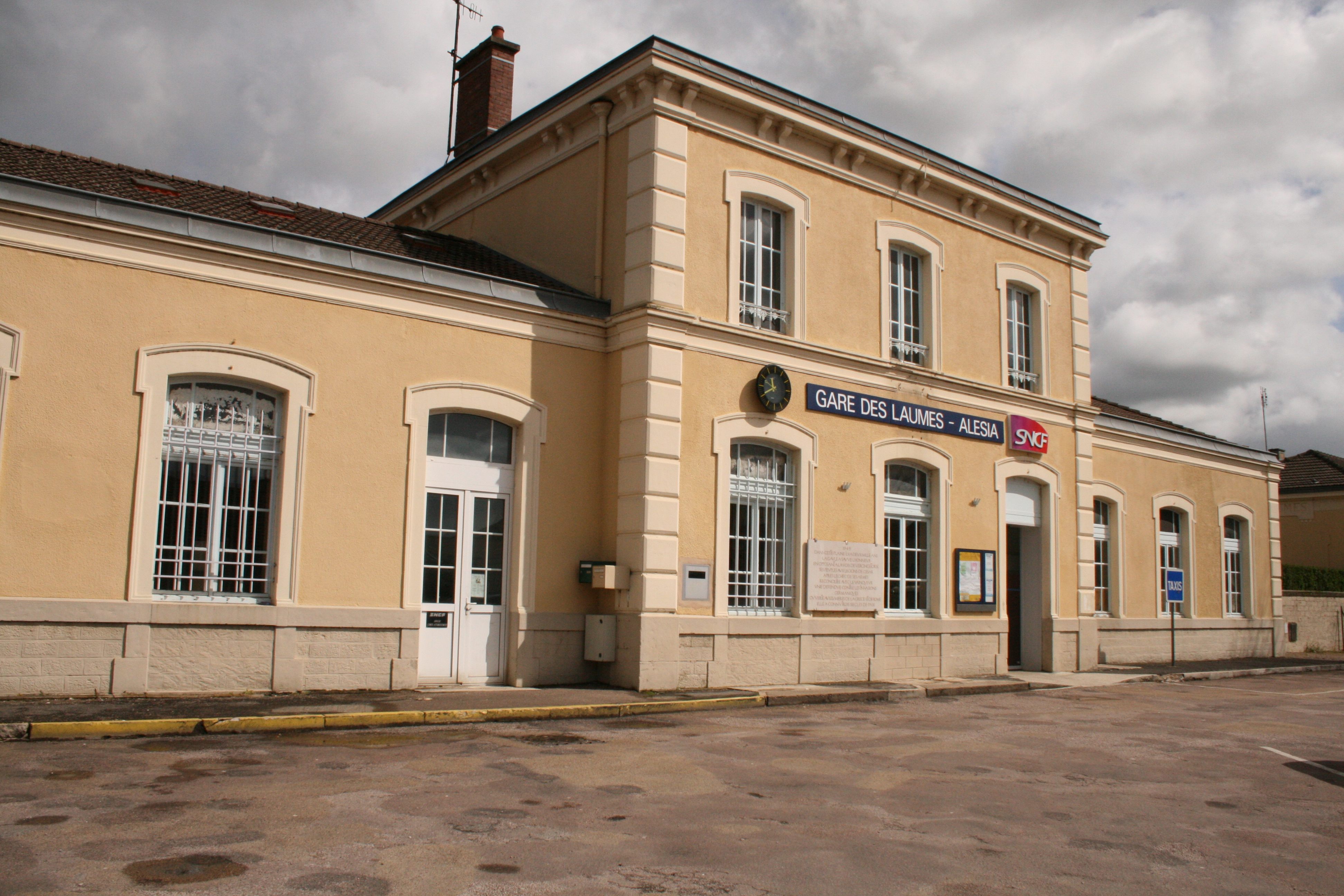 Venarey-les-Laumes Gare